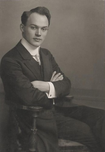 Valentin Šindler český operní pěvec-tenorista, herec